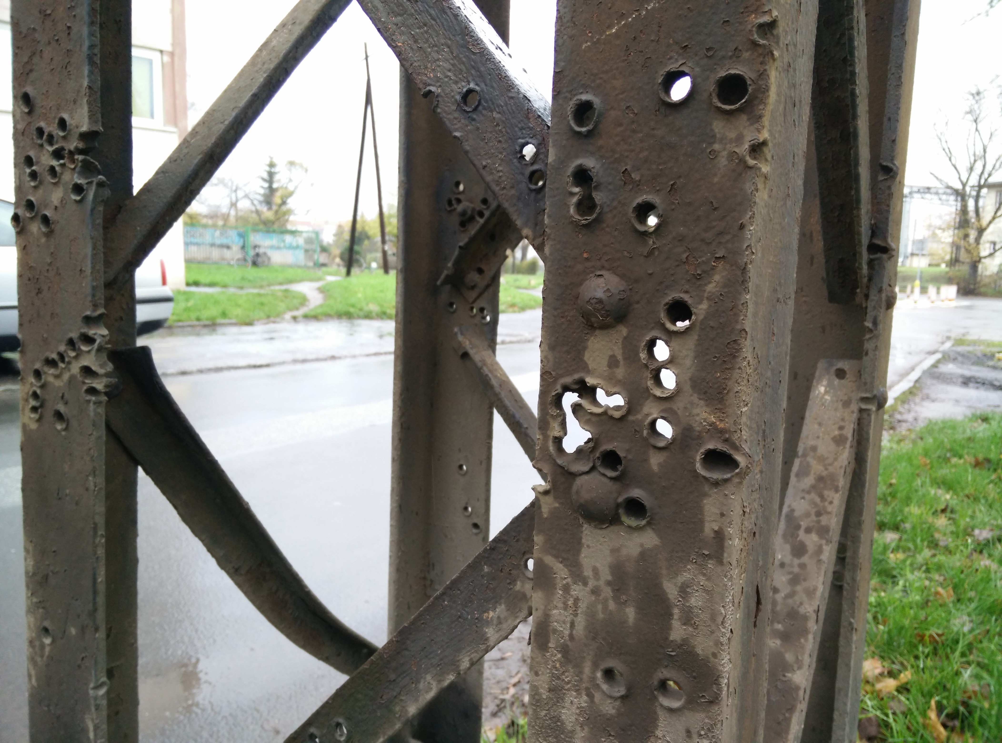 Słup z przestrzelinami przy ulicy Koreańskiej